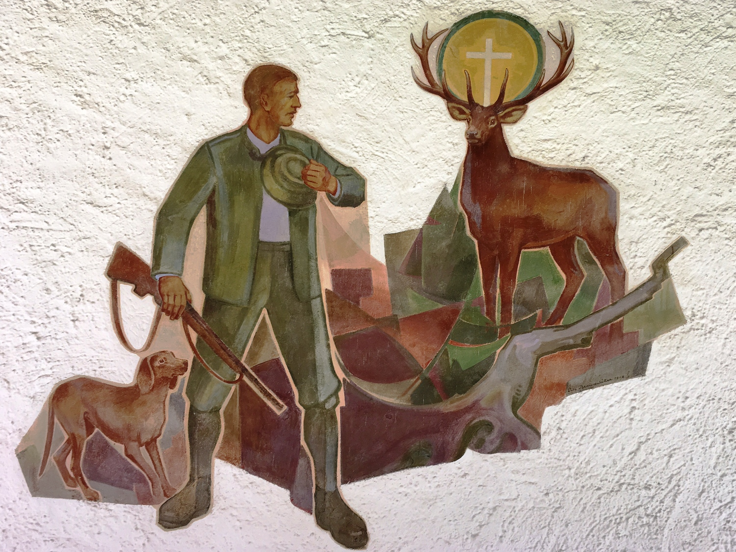 Malerei an der Fassade der Hubertuskapelle in Feld am See, Bezirk Villach Land, Kärnten, Österreich, Europäische Union